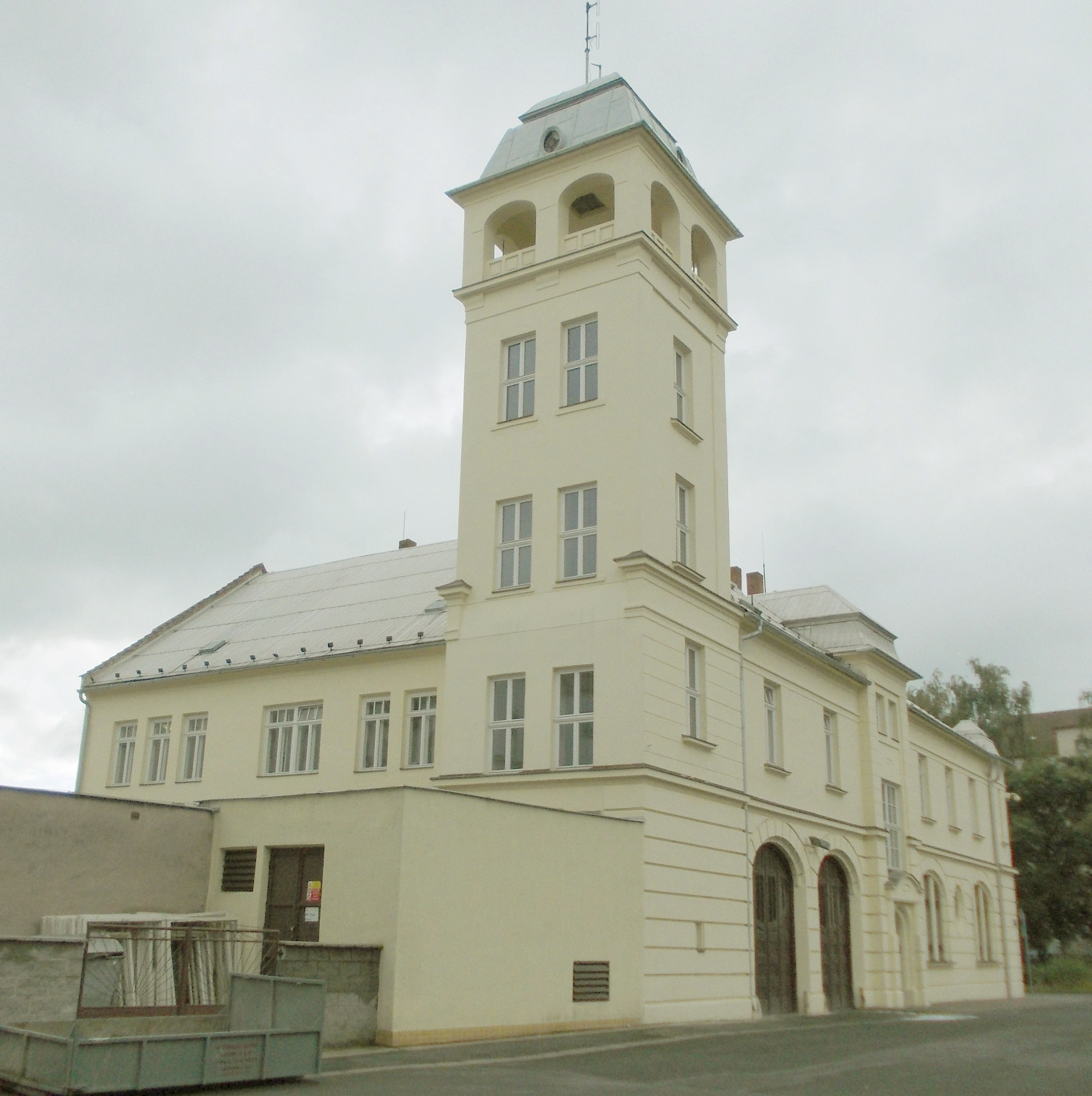 Hasičská zbrojnice, U Požárníků 61/33, Pod Bezručovým vrchem, Krnov. Známý pohled z parku.